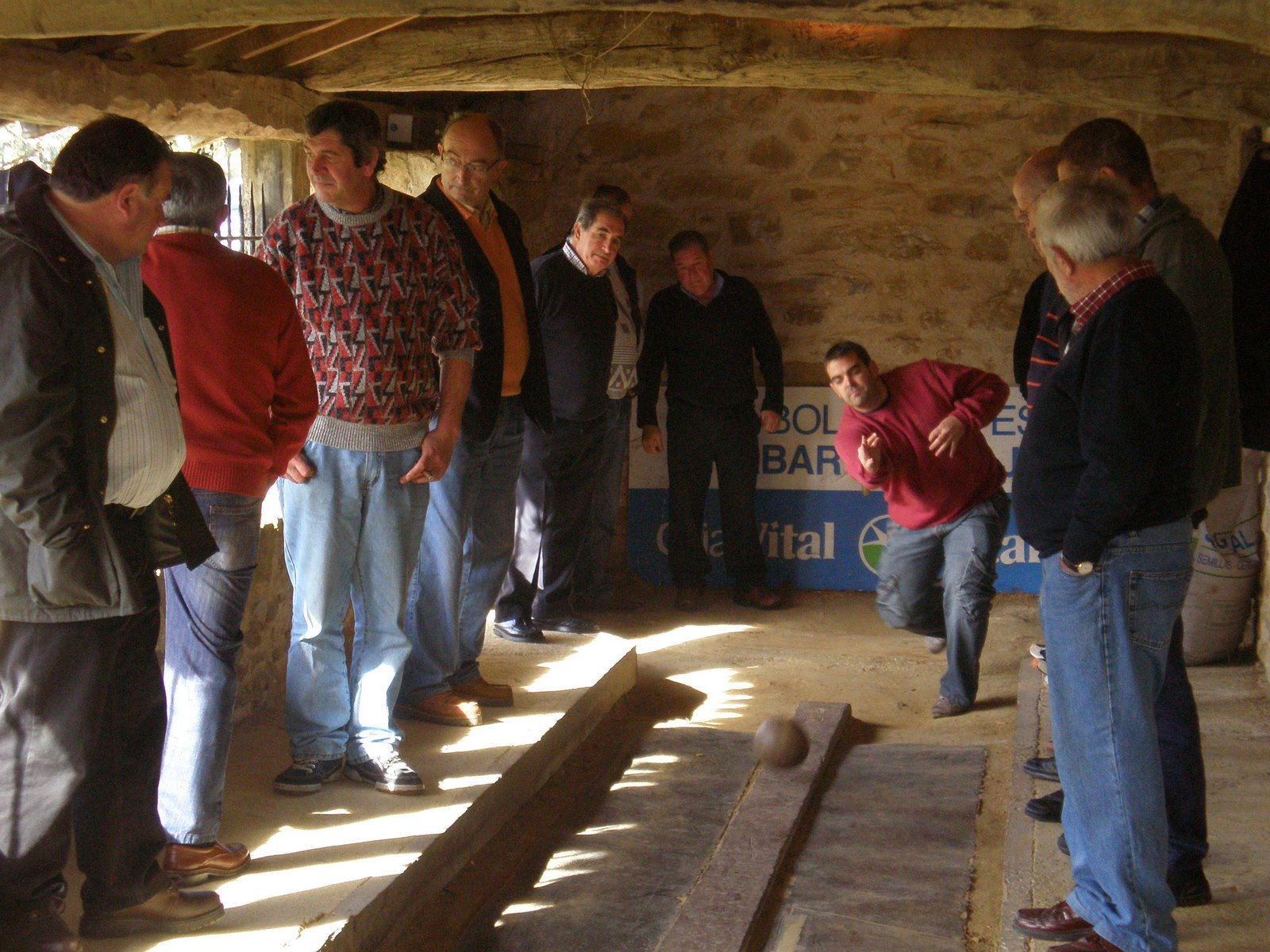 Bolo txapelketa, 4ª JORNADA DEL XXI CAMPEONATO DE BOLOS DE ZIGOITIA EN MURUA